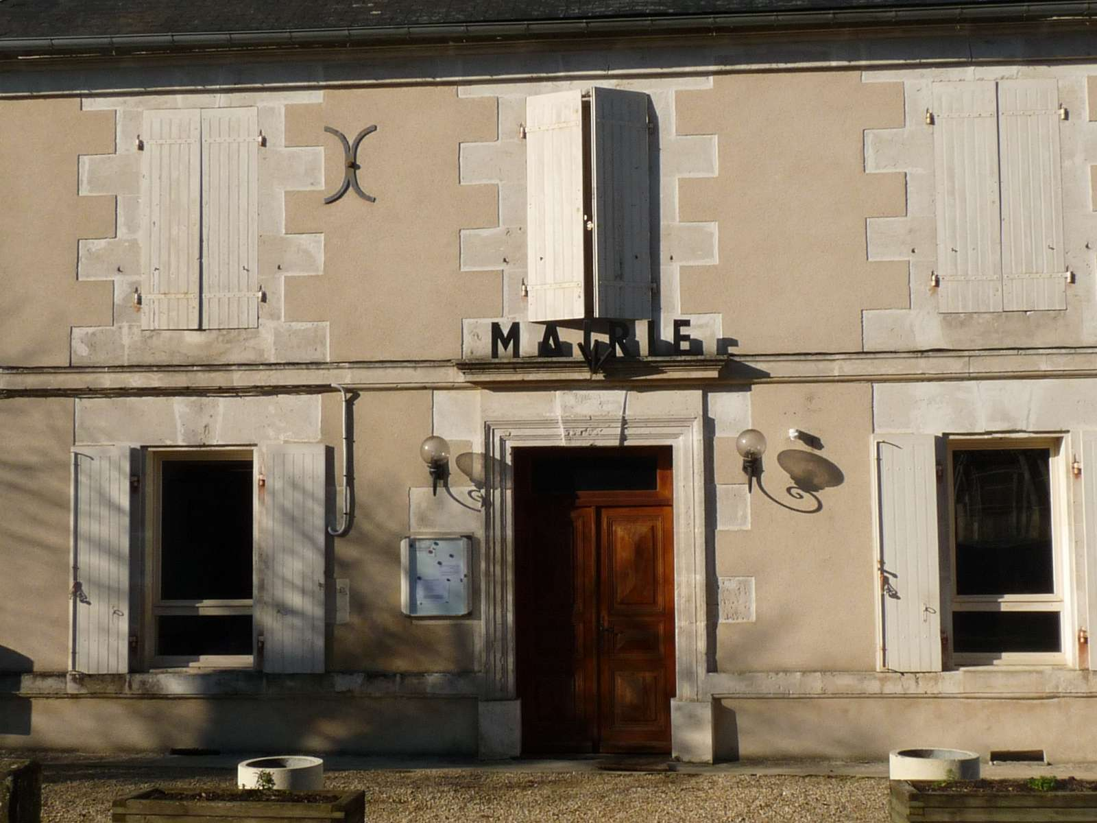 mairie de Moulidars, Charente, France